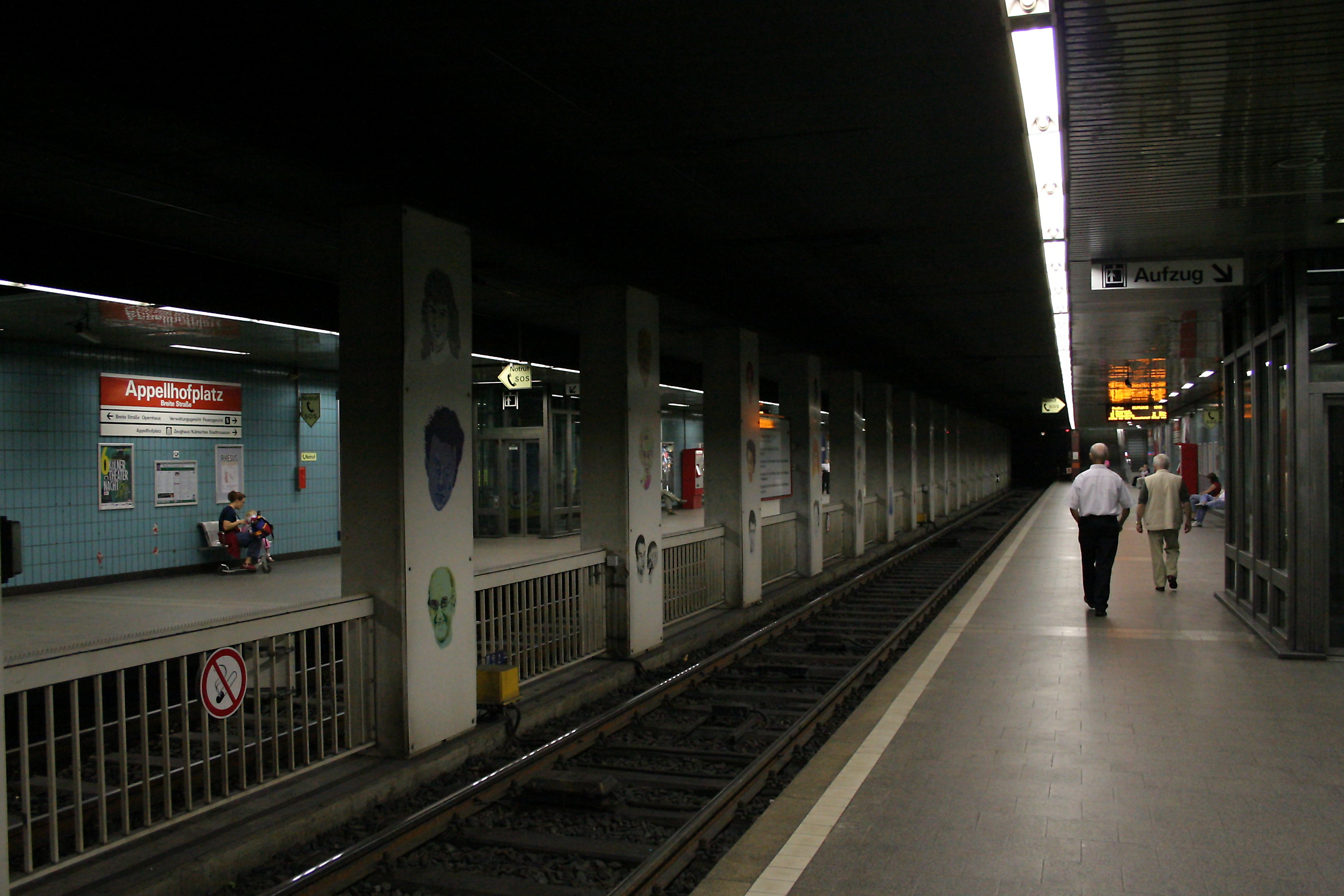 Stadtbahnhaltestelle Appellhofplatz/Breite Straße in Köln, Zustand 2006